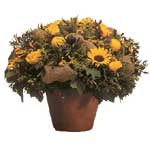 Foto gemaakt van Biedermeier boeket; daarna met The Gimp een witte achtergrond toegevoegd.